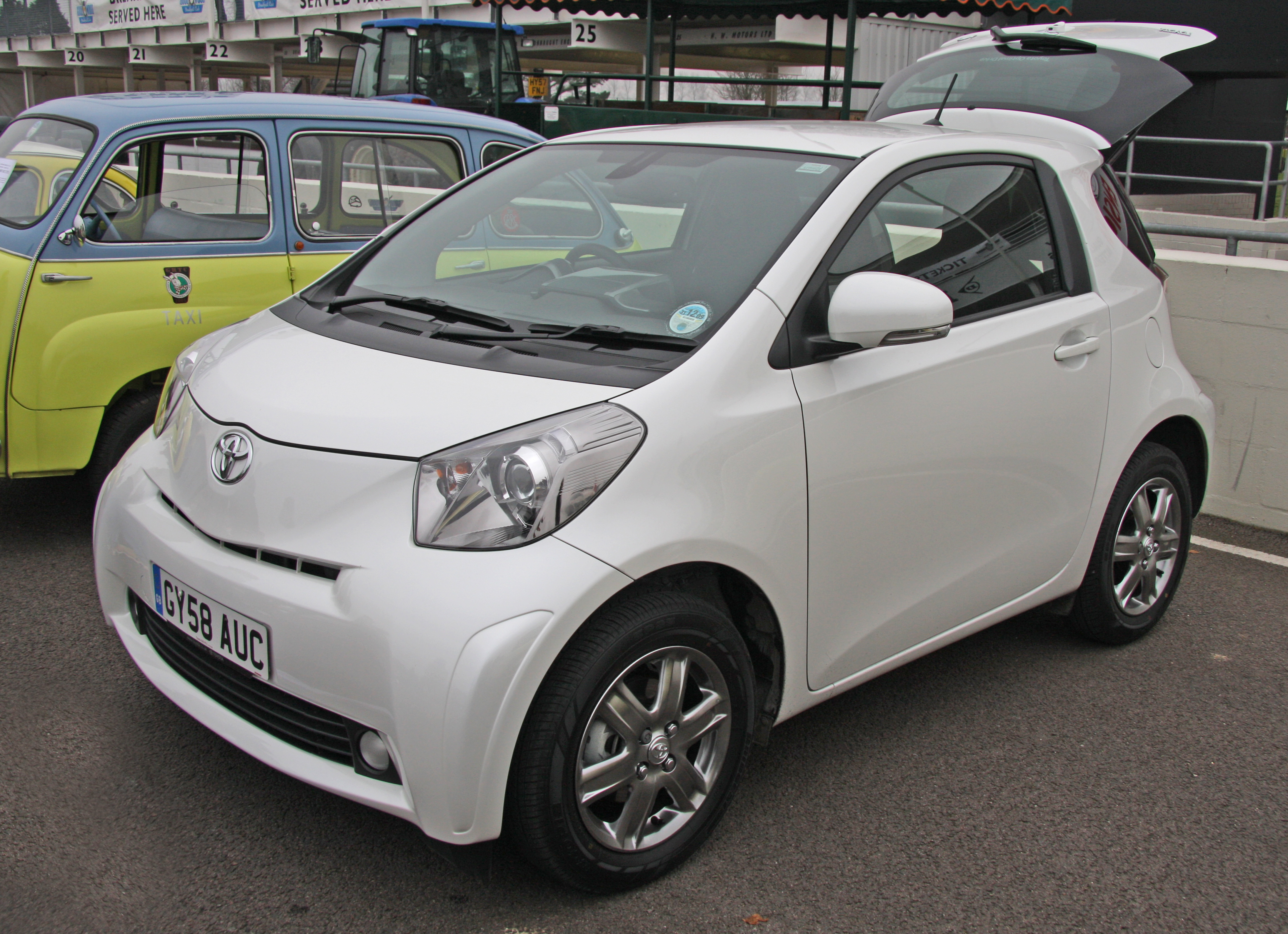 Toyota iQ